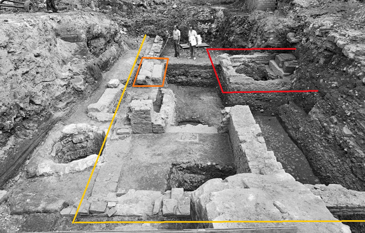 Opgravingen Derlon. Binnen de okerlijnen zijn de muren van het heiligdom te herkennen, binnen de oranje lijnen de toegangspoort en binnen de rode lijnen de perk waarbinnen zich een gebroken steen van de sokkel van de Jupiterpijler bevindt.